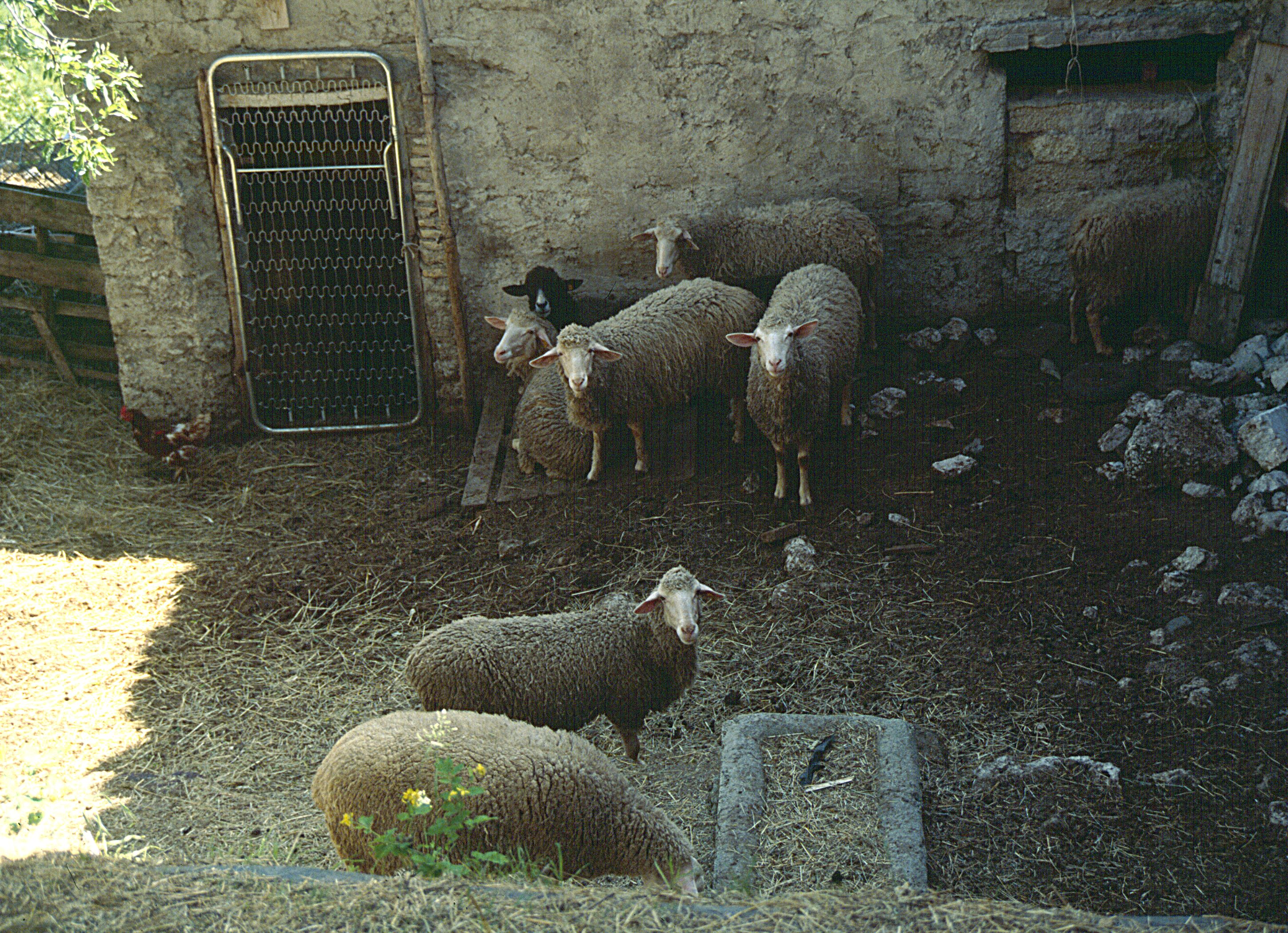 Schafstall in Ortona dei Marsi